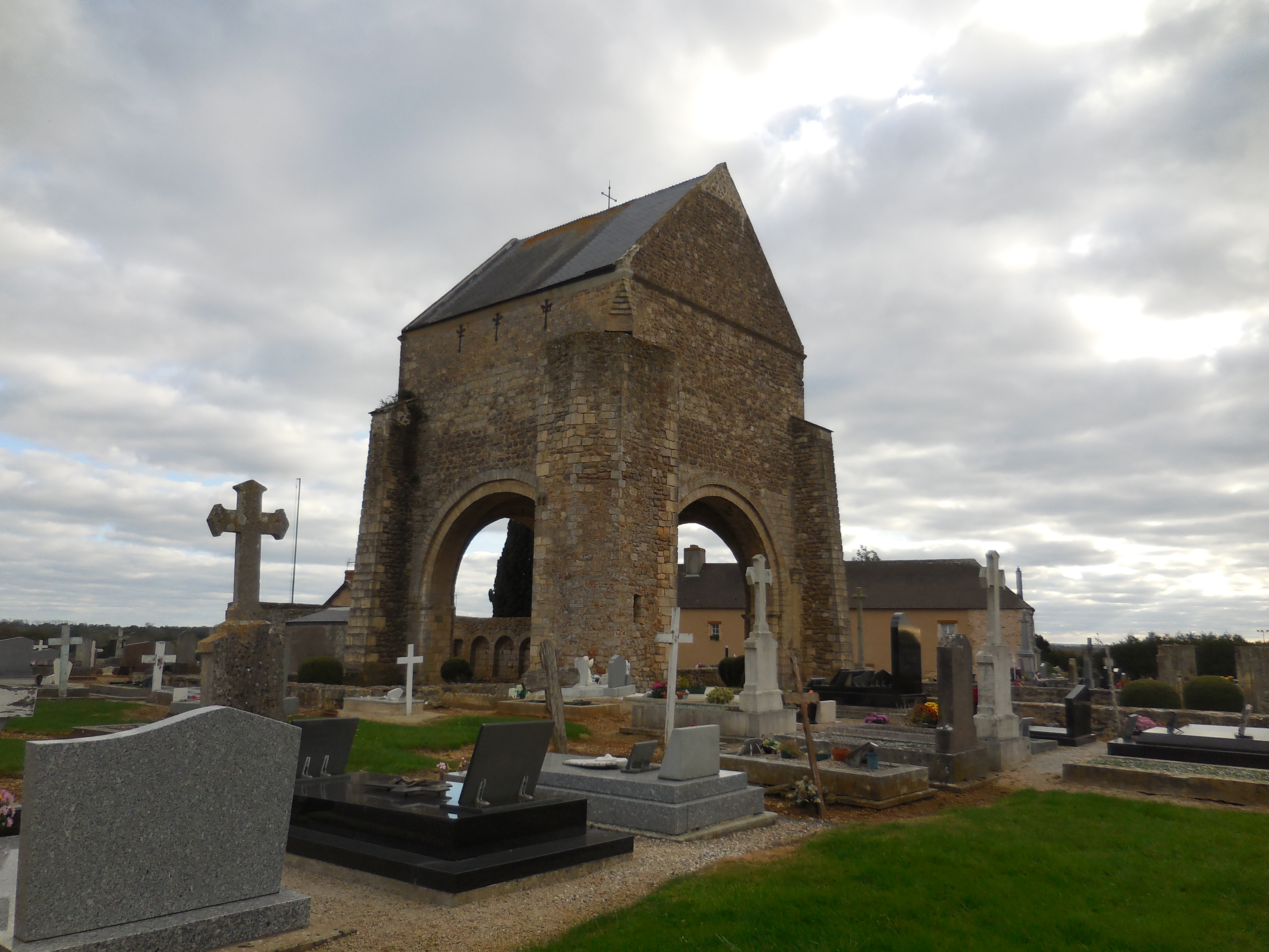 Mémorial franco-américain